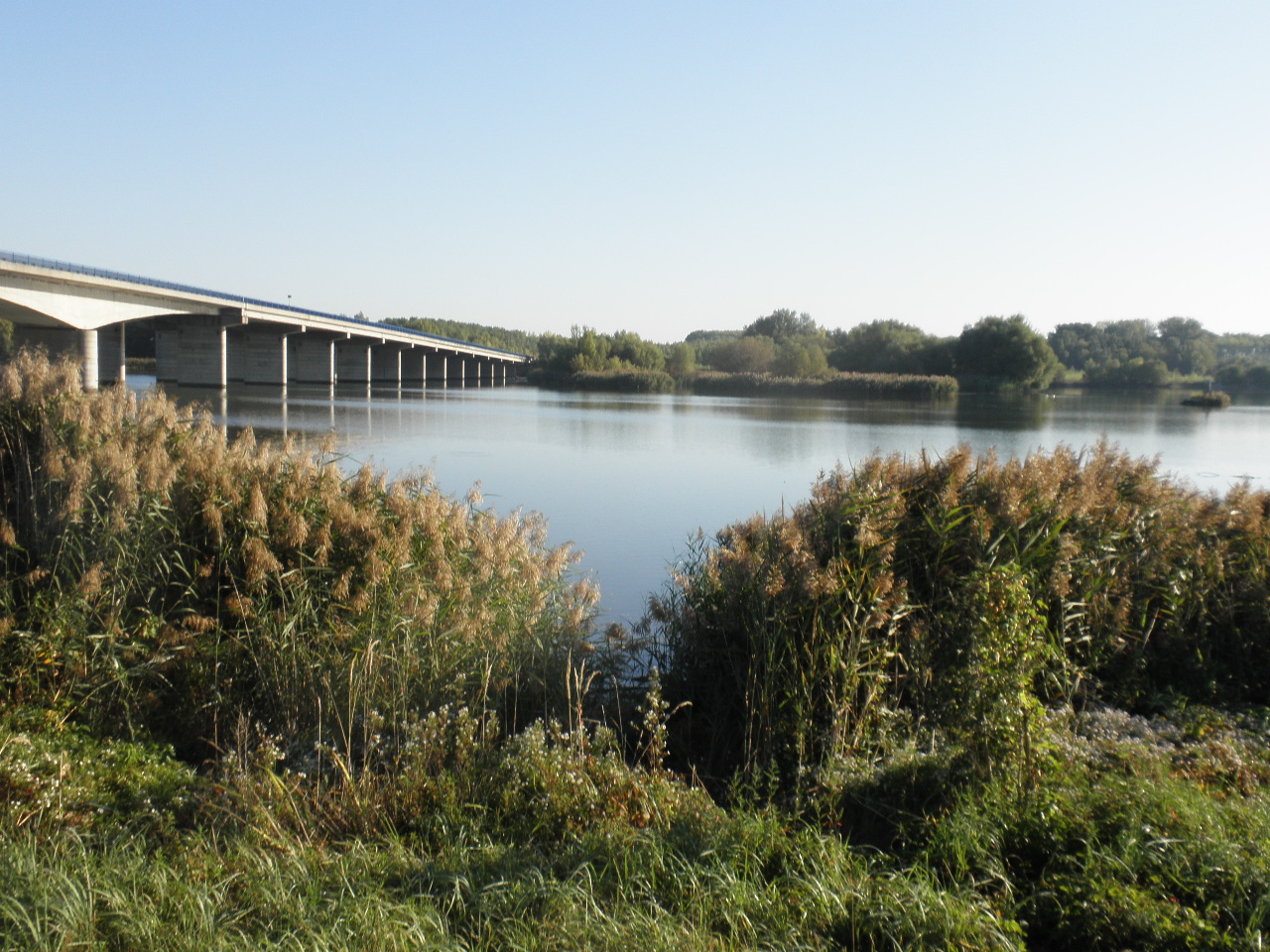 híd a Vág folyó felett